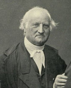 Foto des Chemikers Antoine-Jérôme Balard (1802-1876)